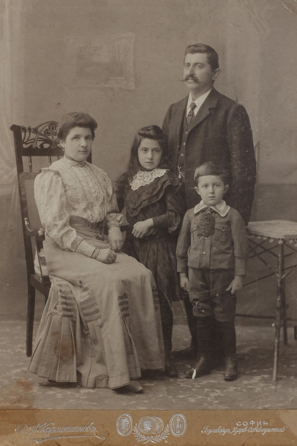 Никола Шавкулов със съпругата му Екатерина и двете им деца - Василка и Иван. София, 1903 г..